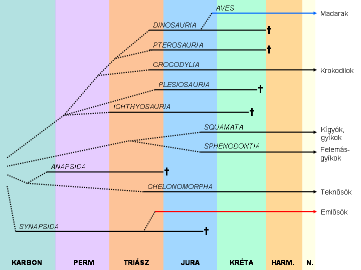 Basal Amniote evolution (hungarian)